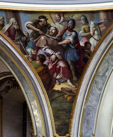 Fresco de José Vergara Gimeno en una de las pechinas de la cúpula de la Iglesia de San Jaime de Vila-Real (1777)